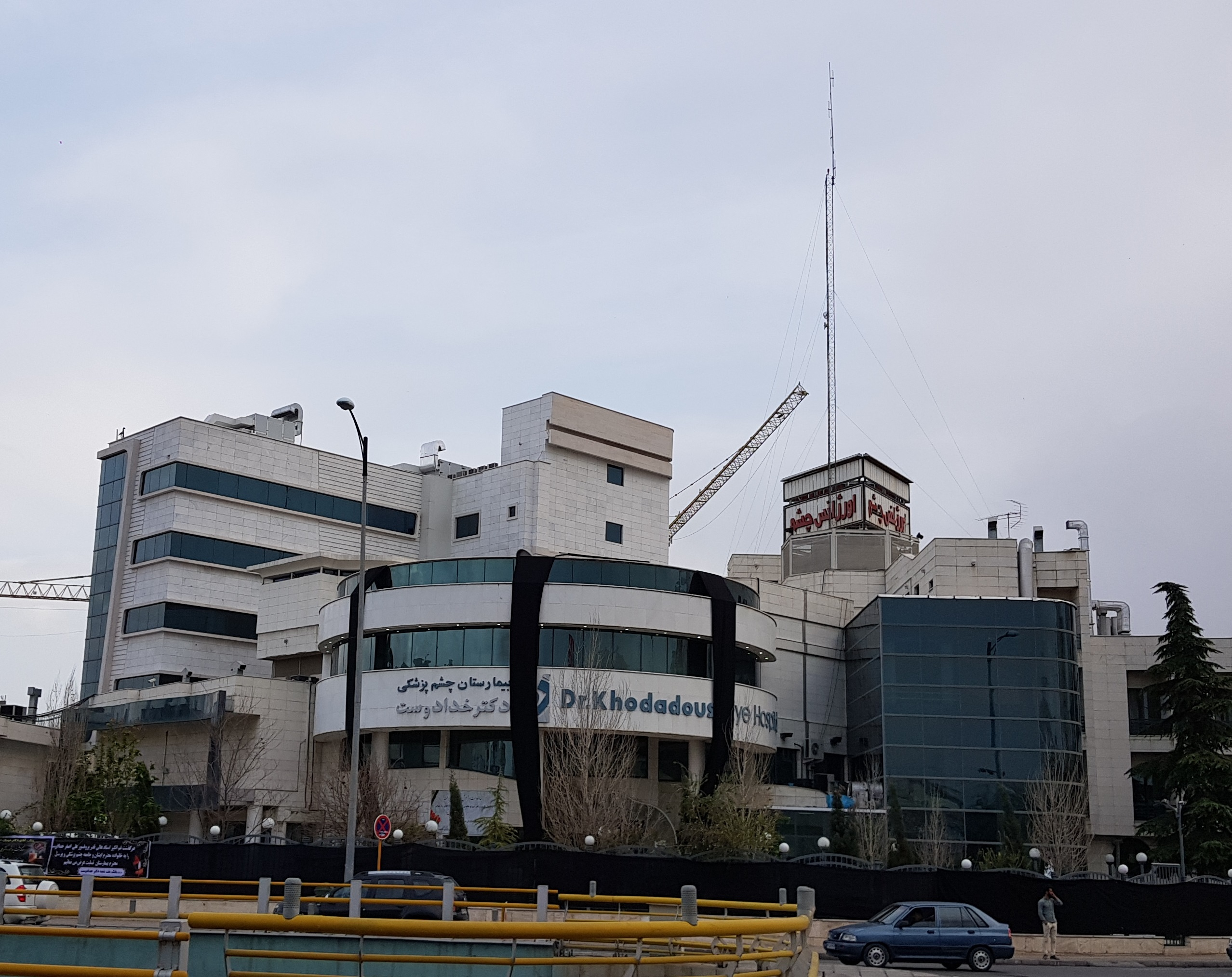 نمای بیمارستان خدادوست که به عزای درگذشت وی نشسته است